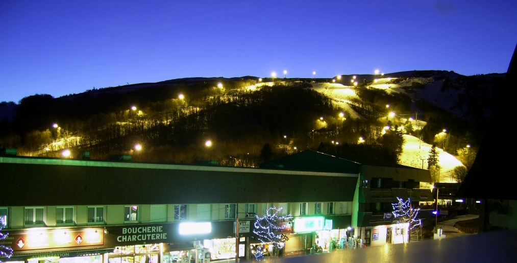 Station de ski de Super-Besse avec ses pistes de ski nocturne